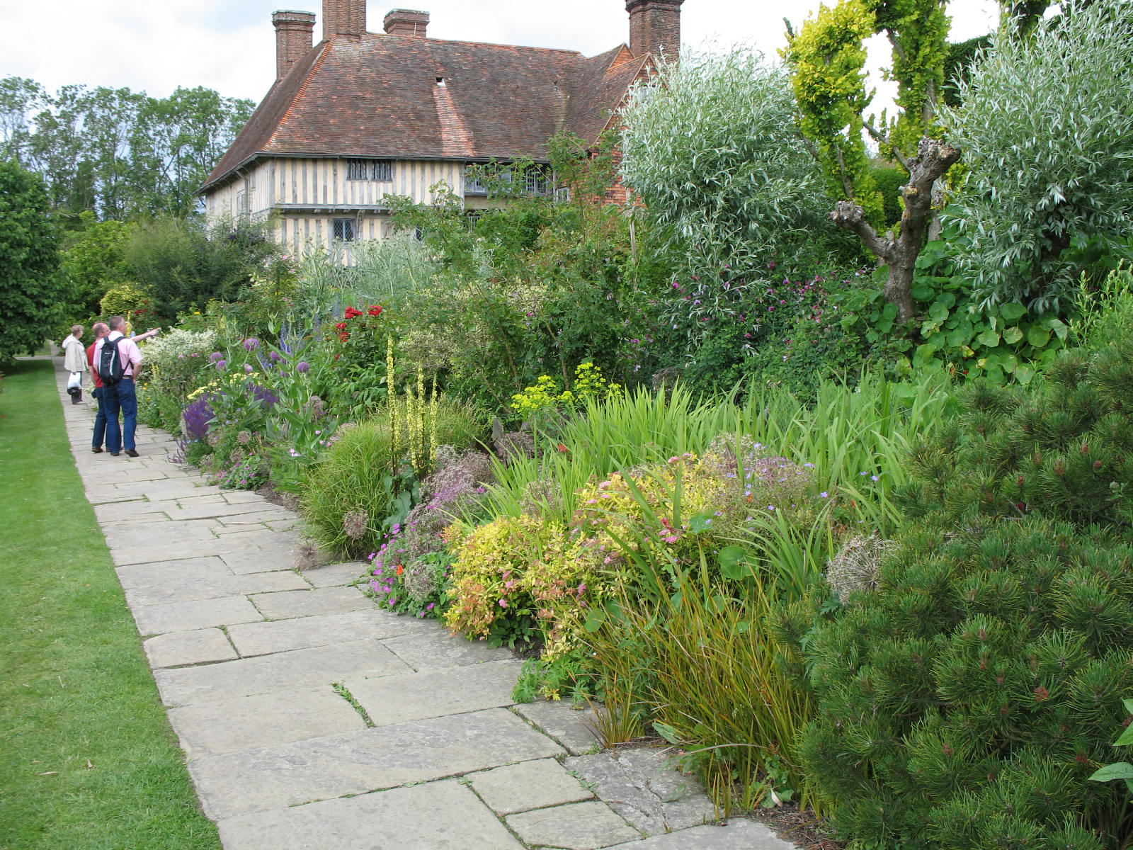 Great Dixter gardens